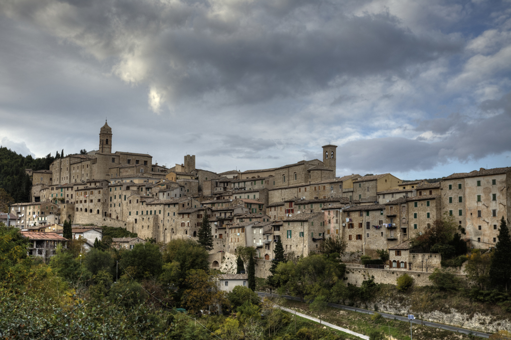 Serra San Quirico, provincia di Ancona, Italy.